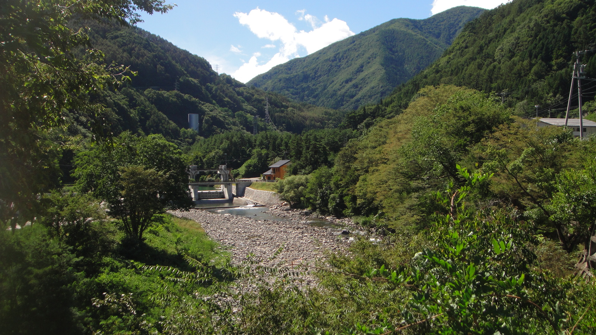 梓川を長野県松本市安曇付近で撮影